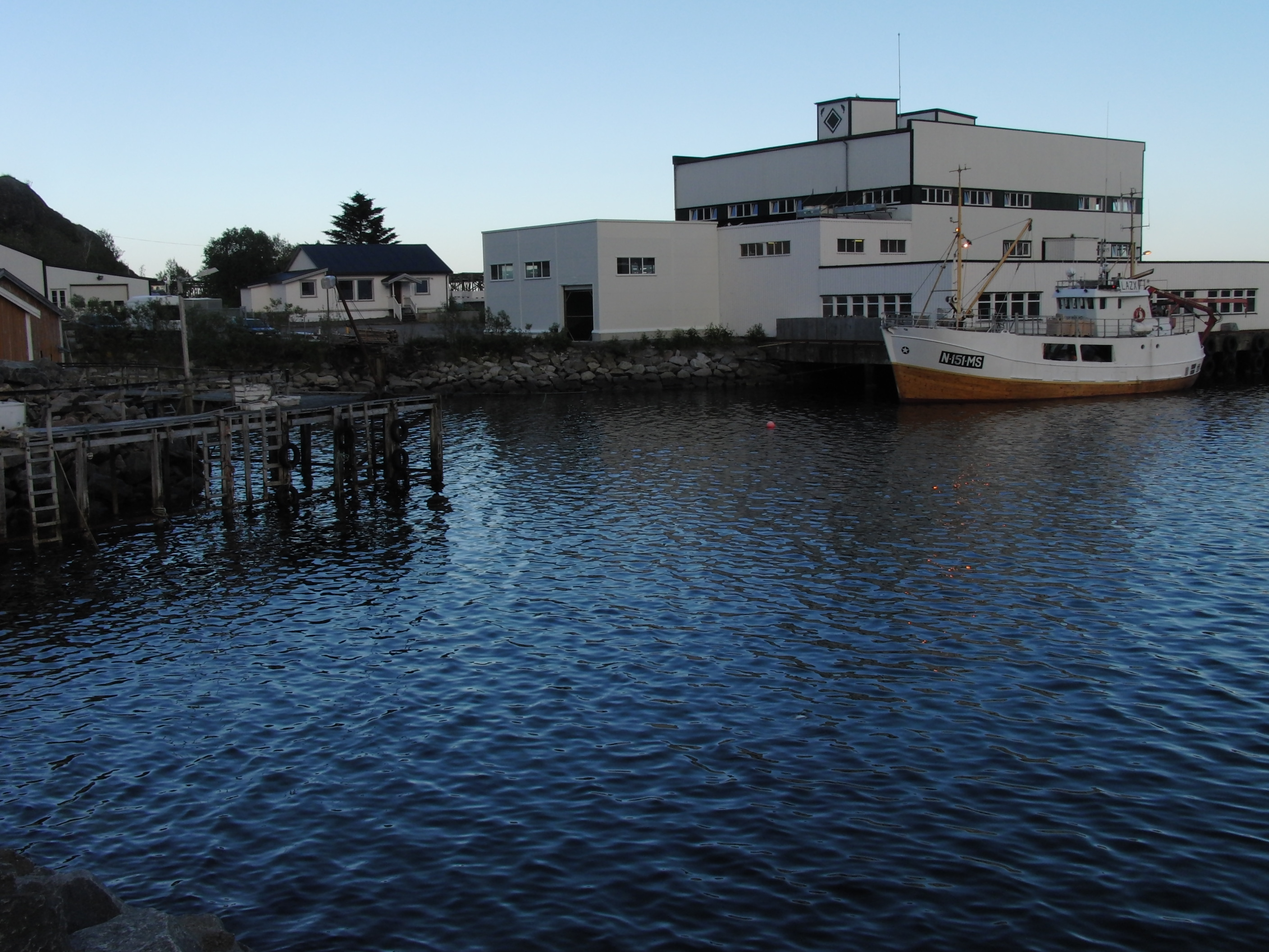 Moskenes Fiskeindustri